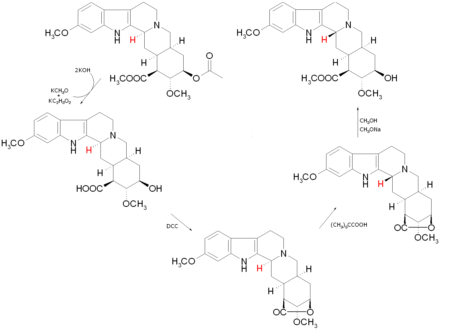 Vorvorletzter und vorletzter Schritt der Reserpin-Totalsynthese nach Woodward: Konfigurationsänderung am Chiralitätszentrum C-3. Das entsprechende Wasserstoffatom ist rot markiert.